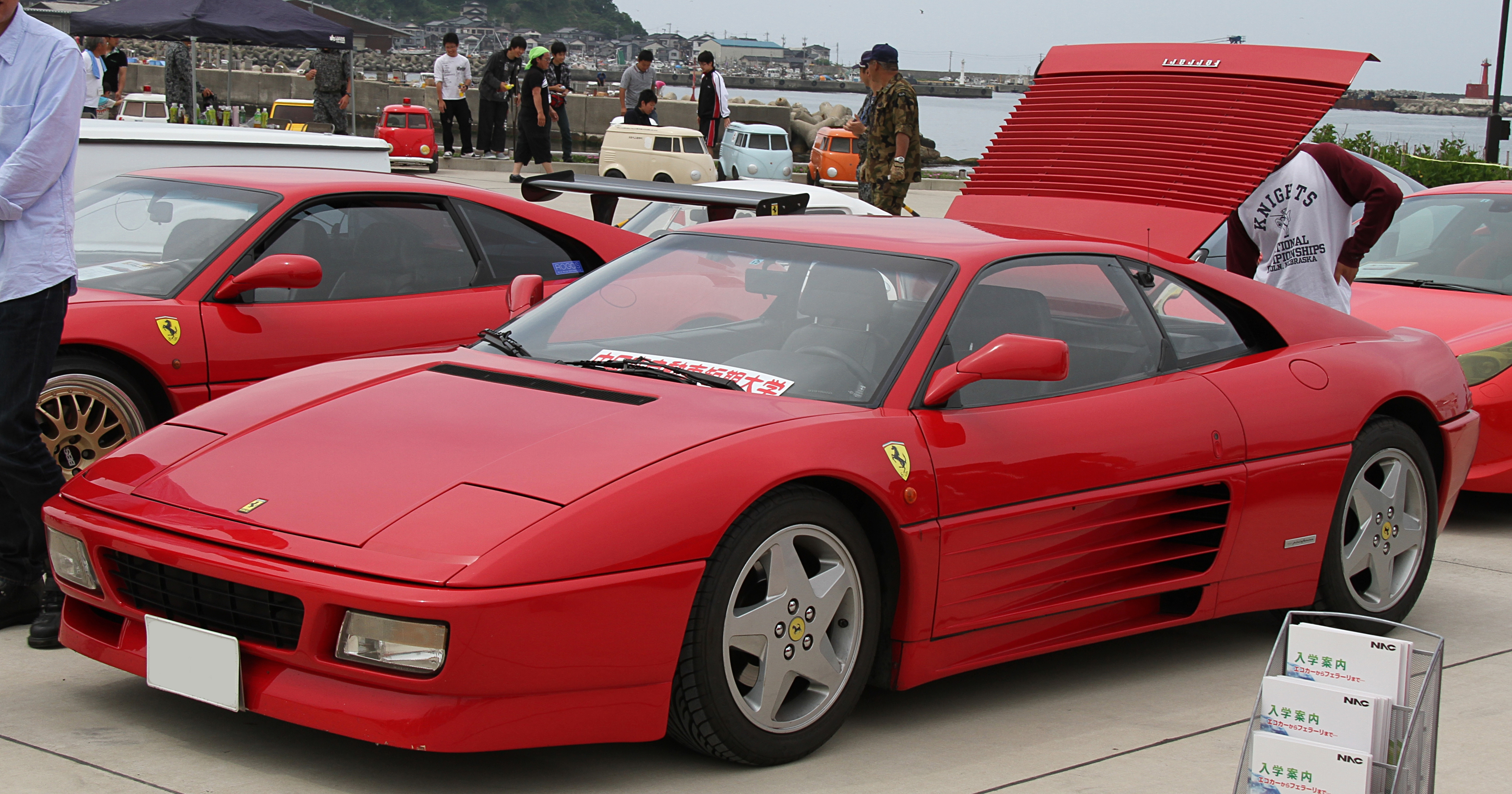 Ferrari 348 GTB